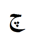 Der persische Buchstabe Tsche in isolierter Form.